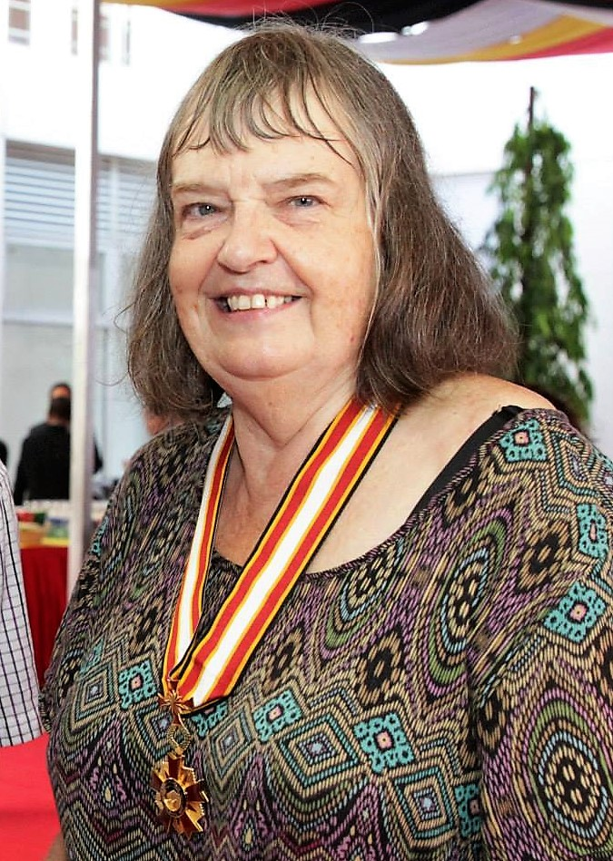 Verleihung des Ordem de Timor-Leste, 30. August 2014. Helen Hill